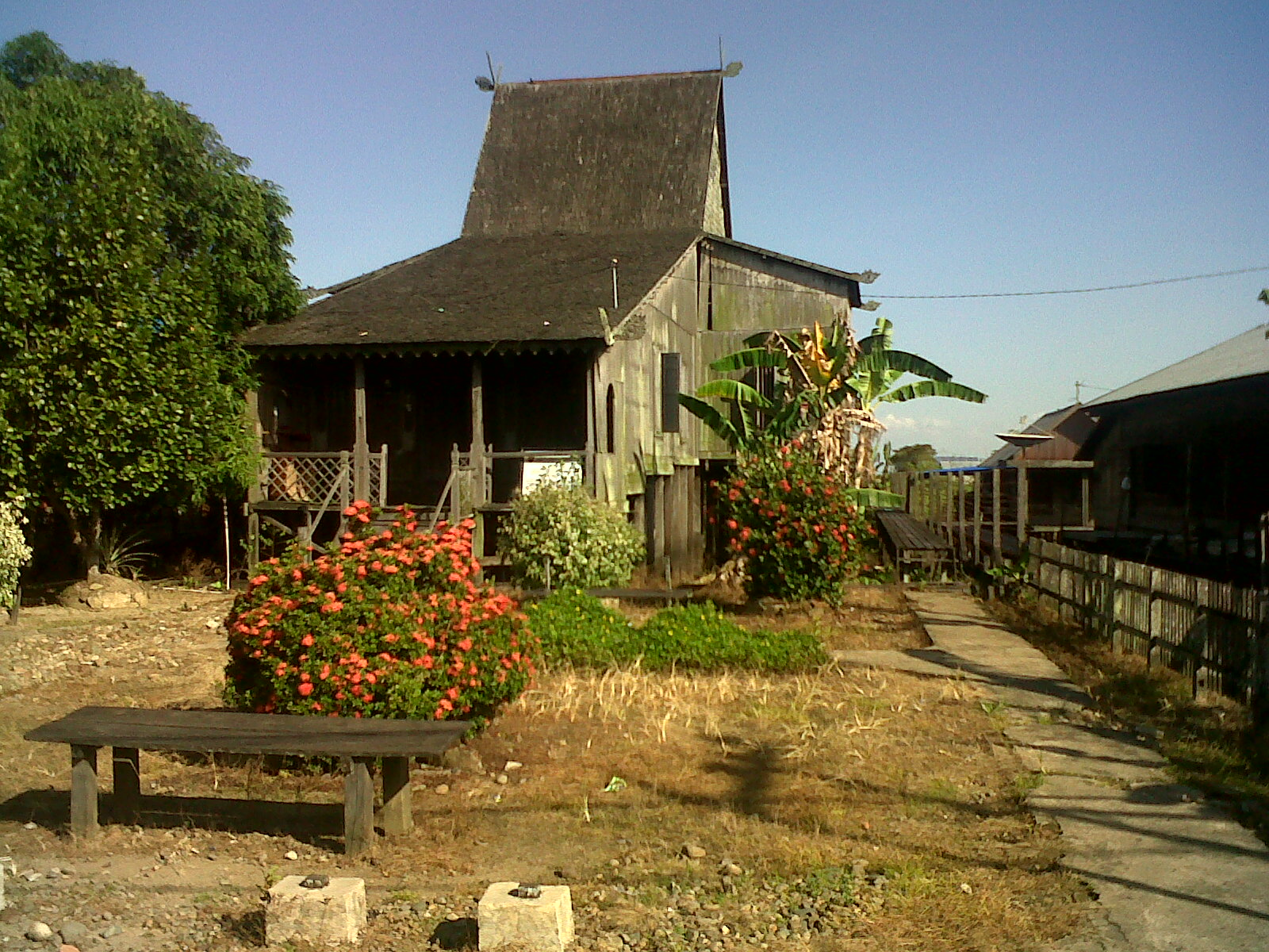 Rumah Adat Banjar Tipe Rumah Bubungan Tinggi Desa Habirau Kecamatan Daha Selatan Kabupaten Hulu Sungai Selatan